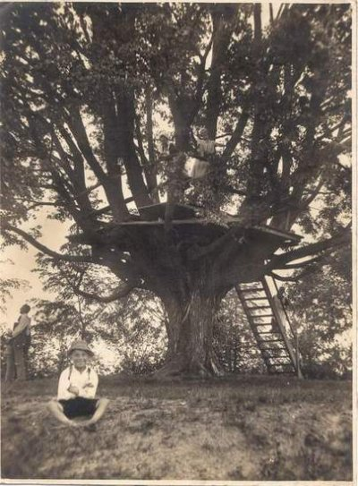 Národní Lípa u obce Libníkovice